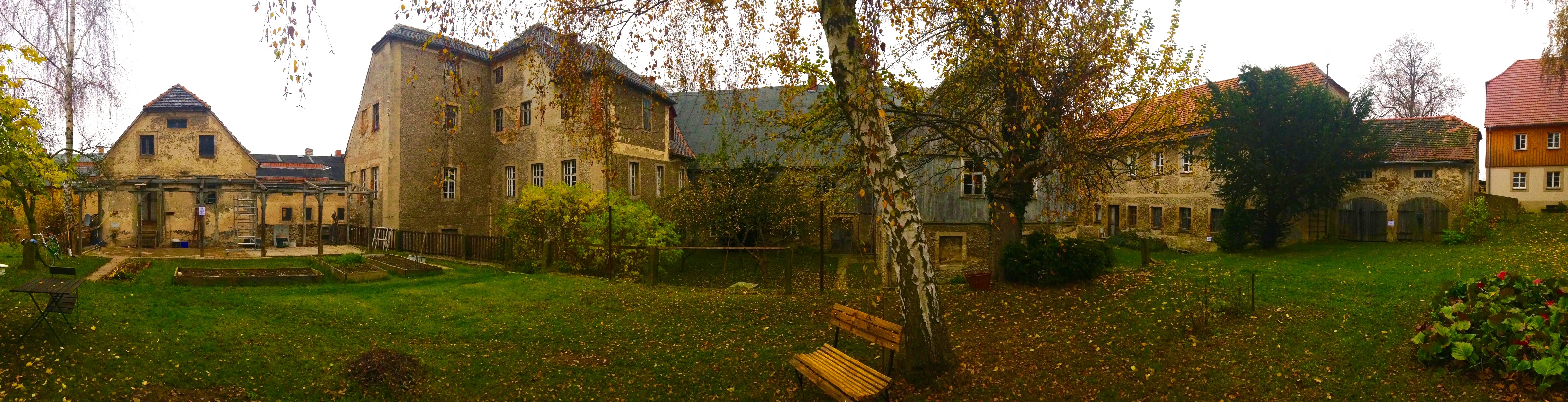 Panorama des Schwesternhausensembles der Kolonie Kleinwelka aus Richtung Süden (Schwesternhausgarten) V.l.n.r.: Remise, Waschhaus (ehemals Kleines Schwesternhaus), Chorhaus, Schwesternhaus, Apotheke, Diasporahaus